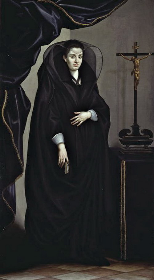 Jacopo da Empoli, Portrait of a Noblewoman Dressed in Mourning, c.1600.jpg: портрет